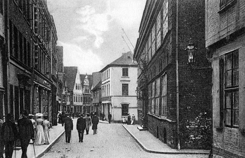 Hökerstraße und Rathaus in Stade